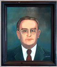 El retrato de Hermión Larios en el Palacio de Minería